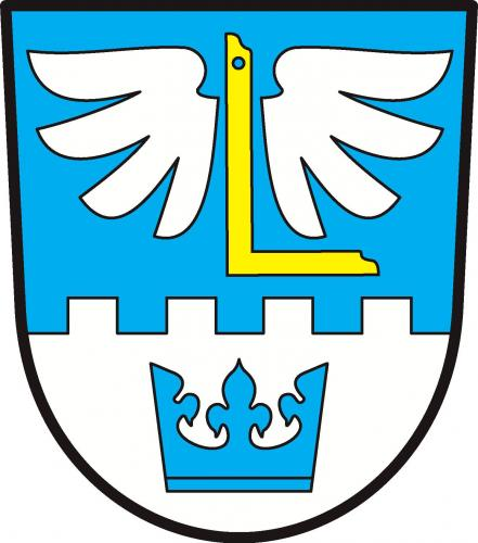 znak obce Letkov